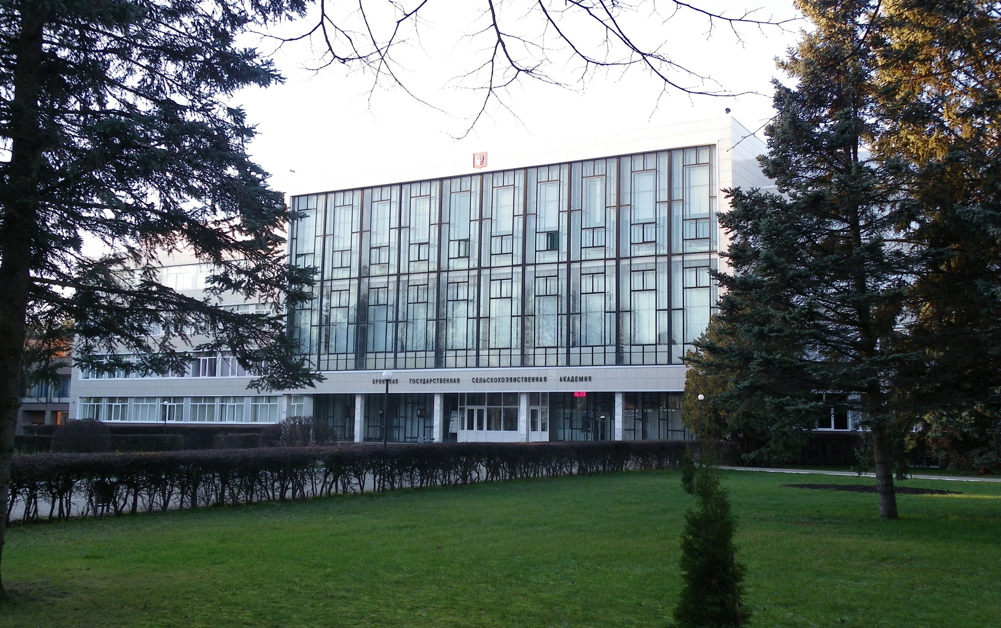 Брянская обл., село Кокино. Брянская госсельхозакадемия. (главный корпус)